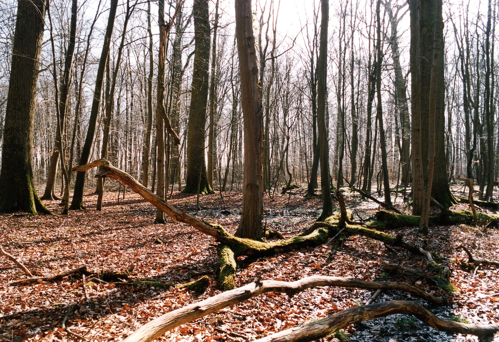 Feuchter Eichen-Hainbuchen-Wald mit liegendem Totholz; Vorfrühlingsaspekt. Quelle: Eigene Aufnahme vom März 2002 aus Nordost-Niedersachsen. Fotograf: Christian Fischer.